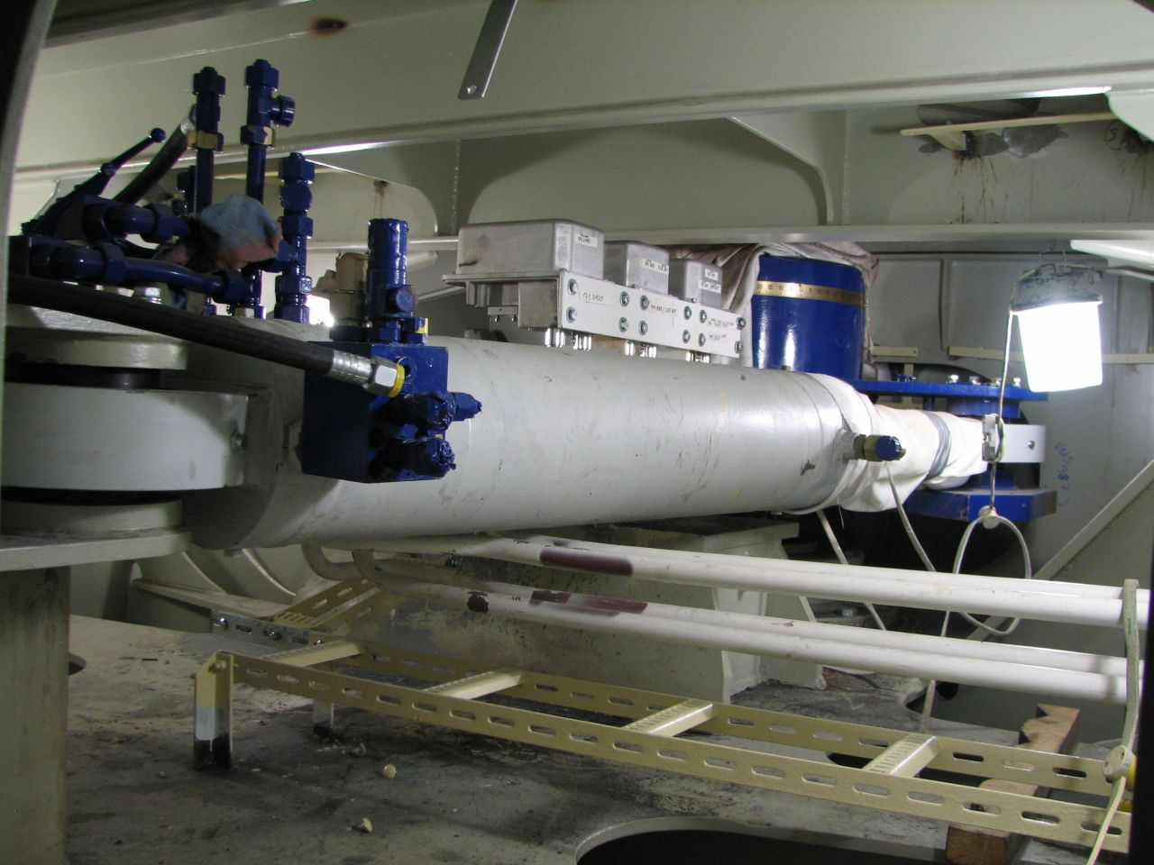 Flensburger Schiffbau Gesellschaft